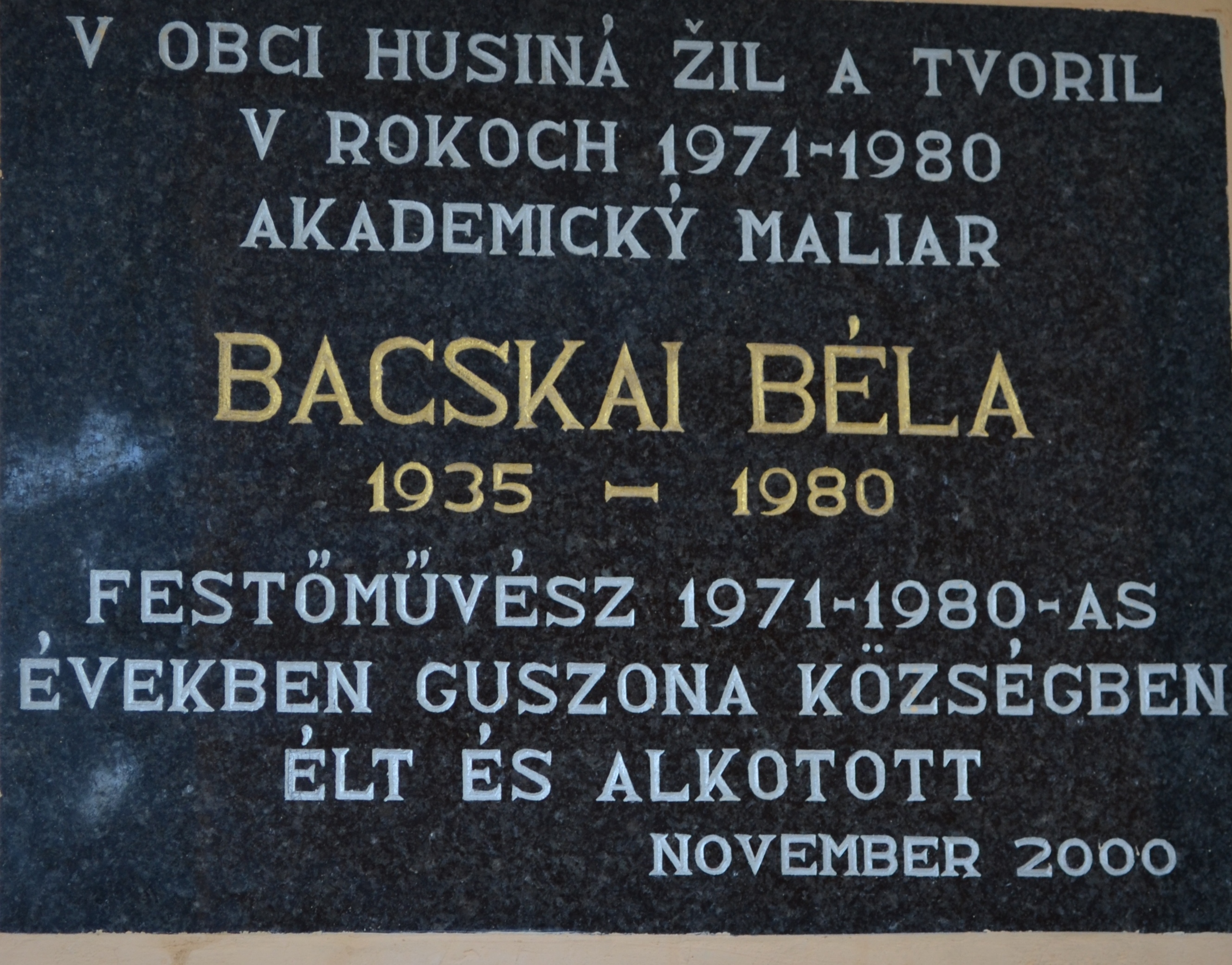 Pamätná tabuľa akademického maliara Bélu Bacskaiho na stene budovy Obecného úradu v Husinej